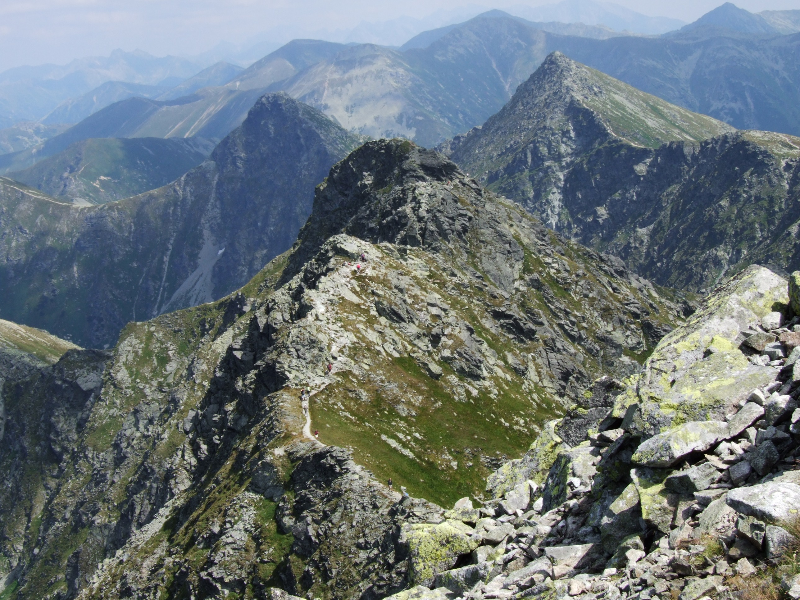 Tri Kopy, Rohače (Trzy Kopy, Rohacze) - West Tatra Mountains